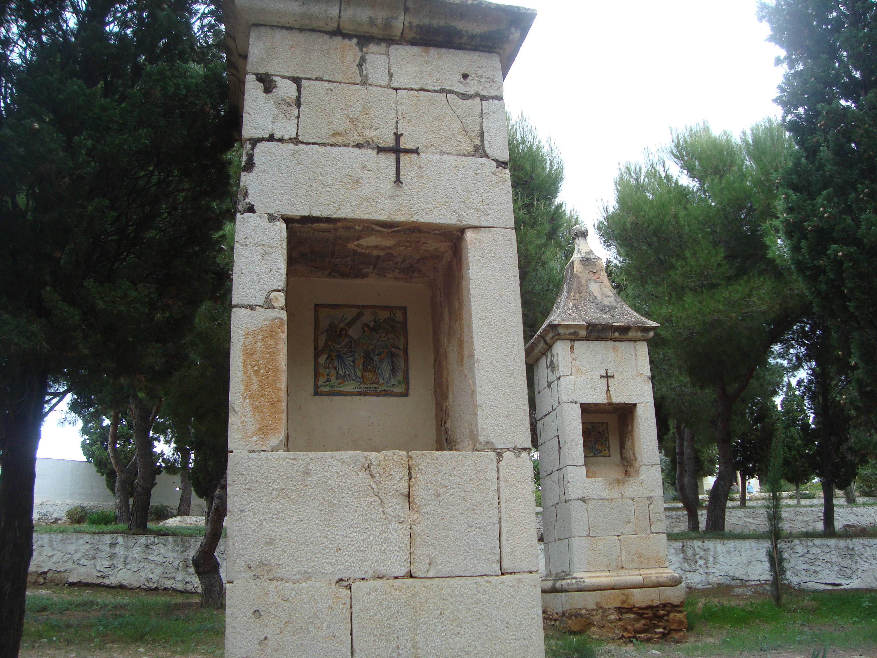 Capelles del Calvari de Torreblanca, Castelló